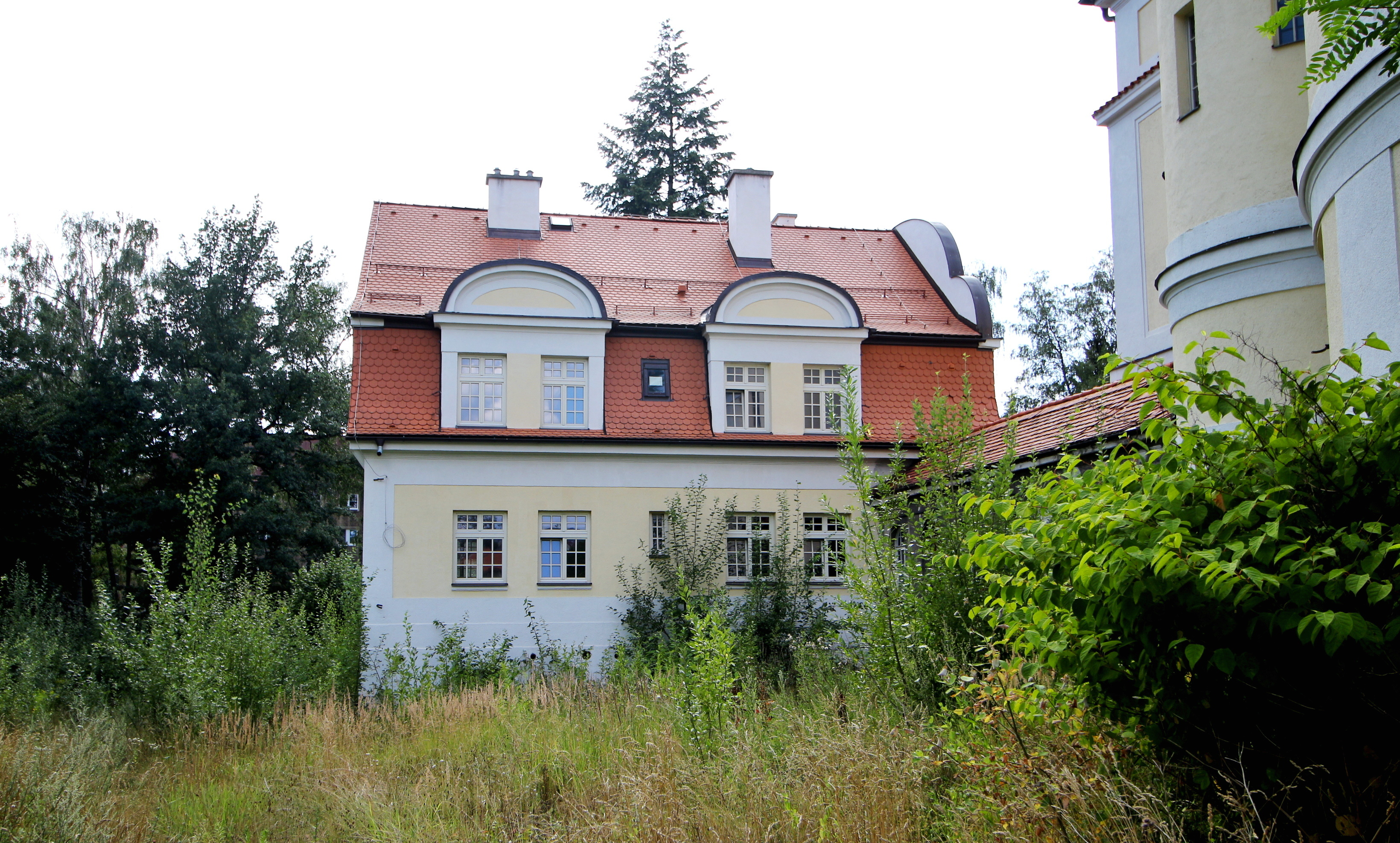 Kapucínský klášter a kostel sv. Máří Magdalény v Liberci